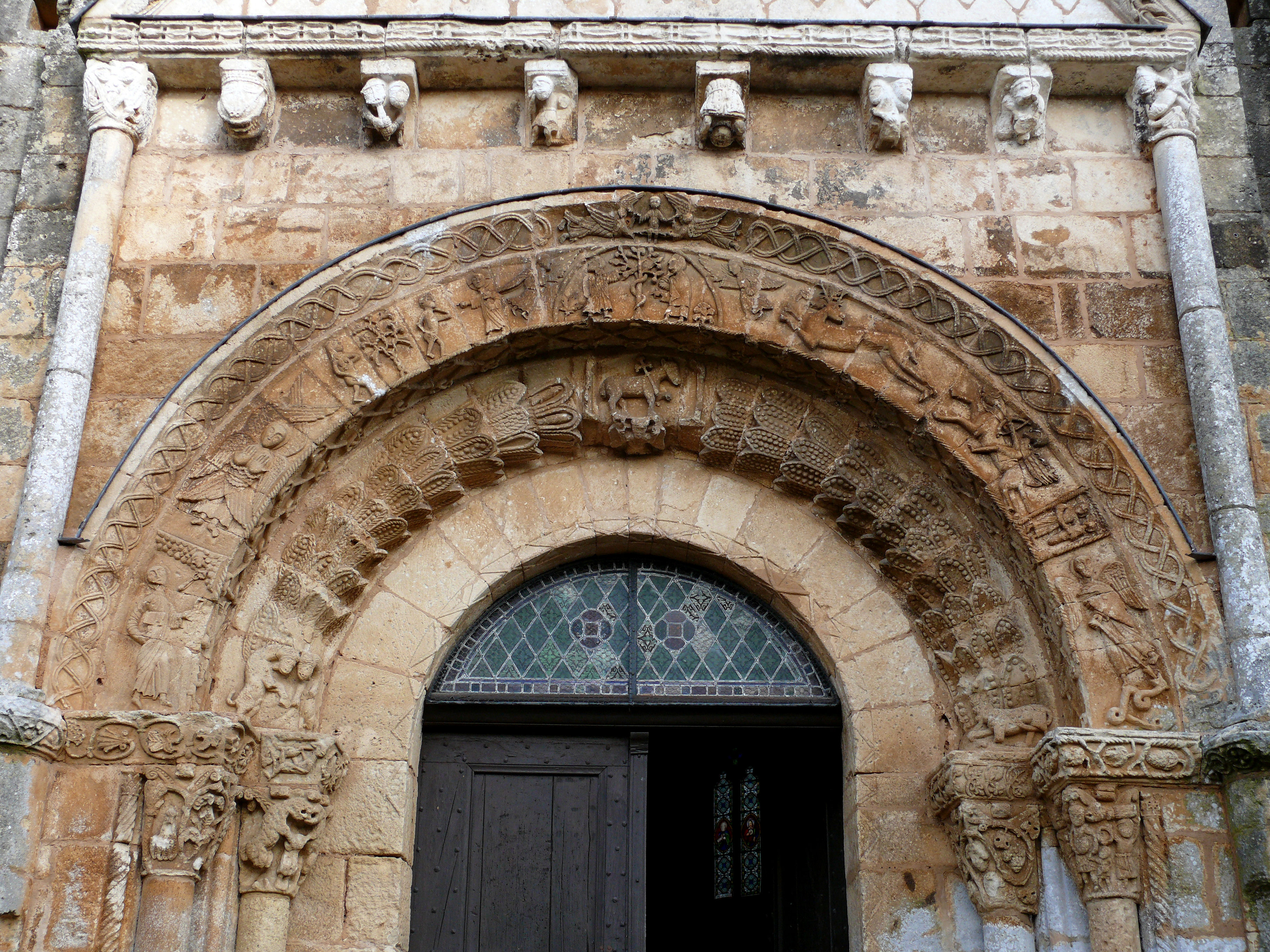 Besse - Eglise Saint-Martin - Portail